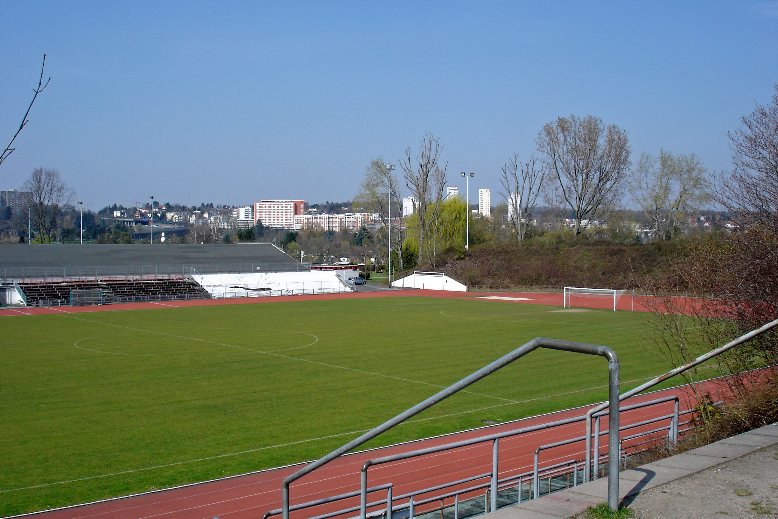 Eintracht-Sportplatz "Riederwald", auf Seckbacher Gebiet